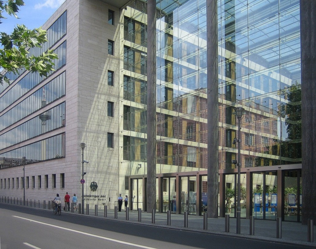 Auswärtiges Amt Berlin, Eingang Werderscher Markt.